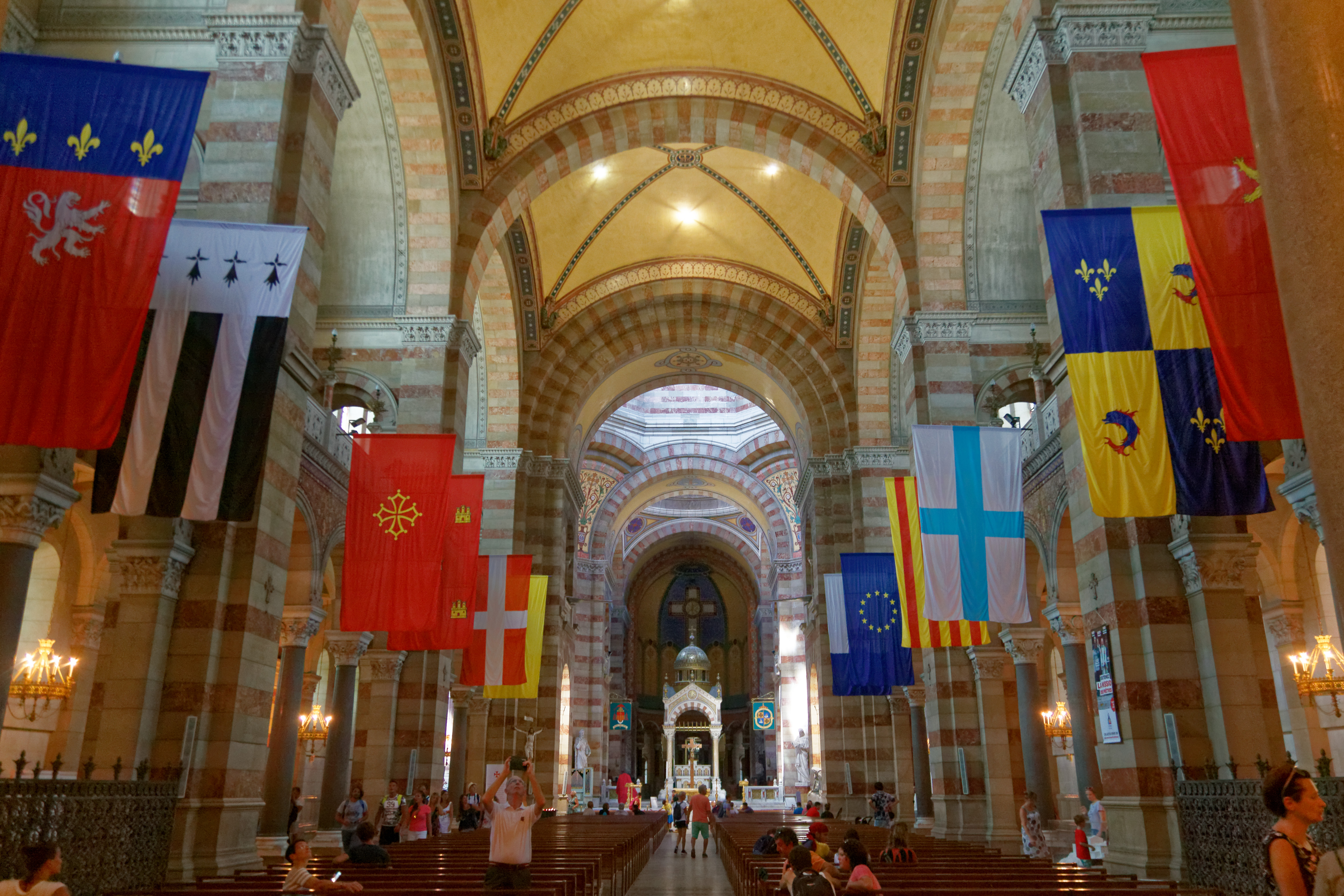 Kathedrale von Marseille